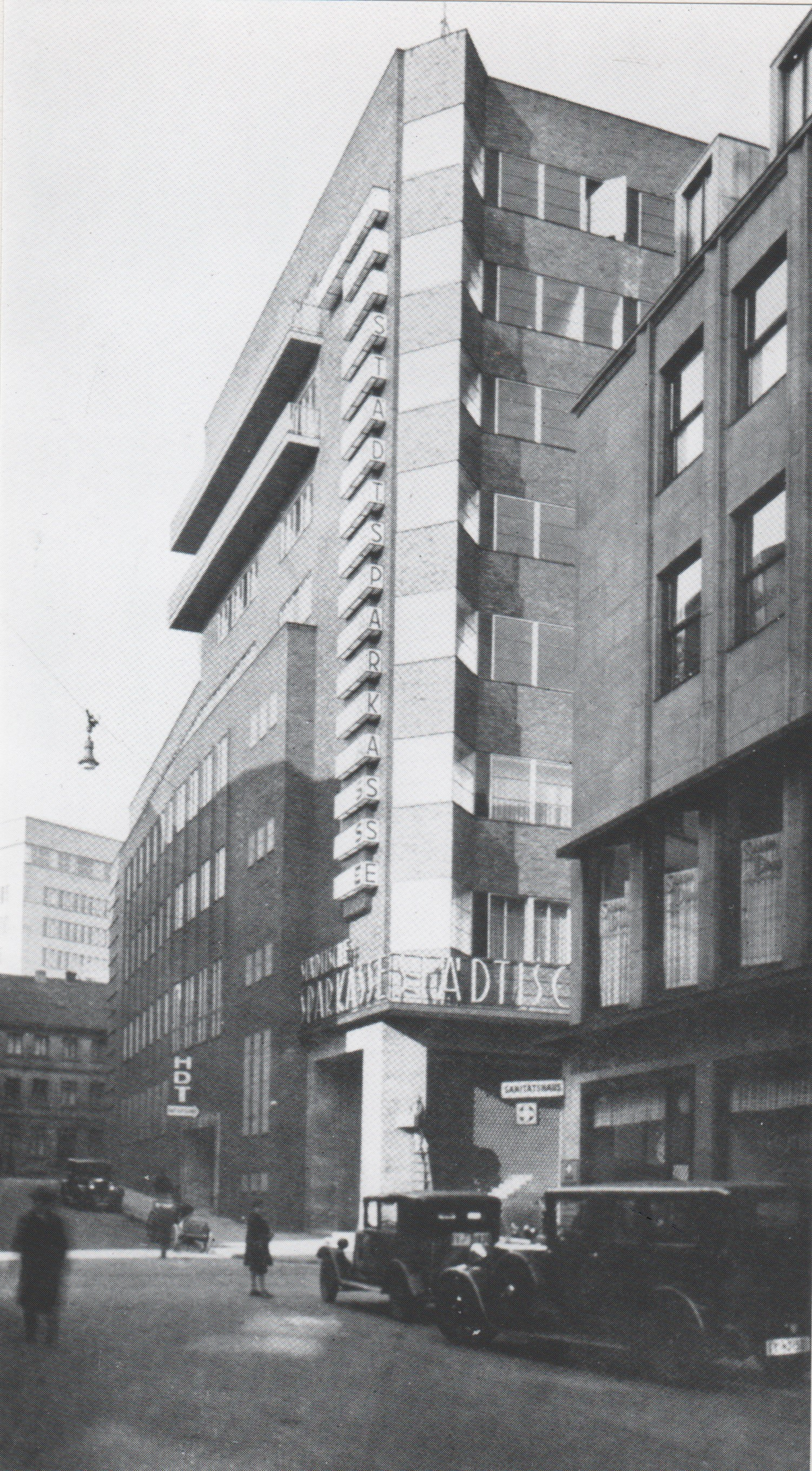 Gebäude der Stadtsparkasse in Essen, Rathenaustraße 2/4, erbaut 1927-1930